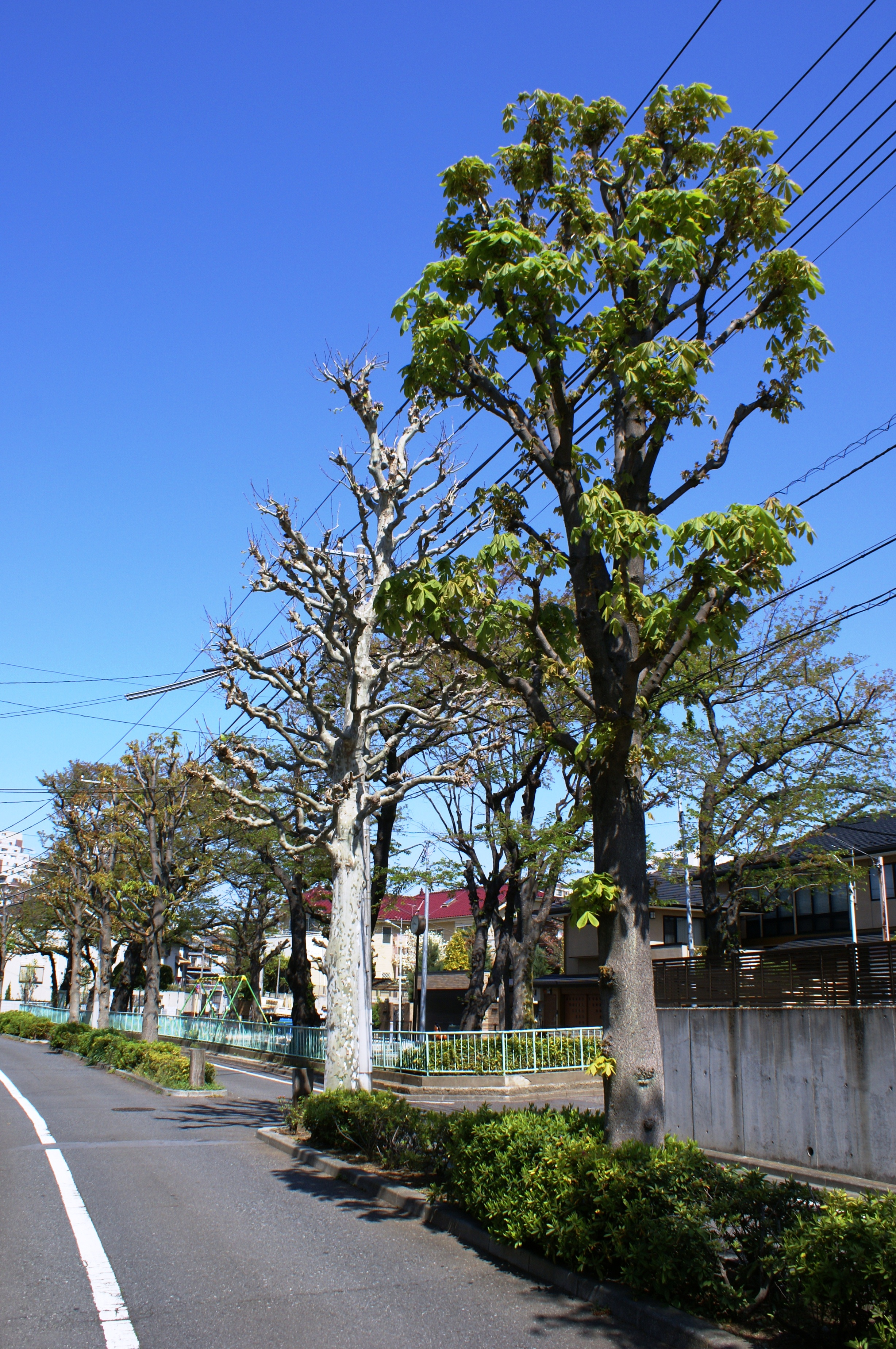 常盤台住宅地プラタナスプロムナード